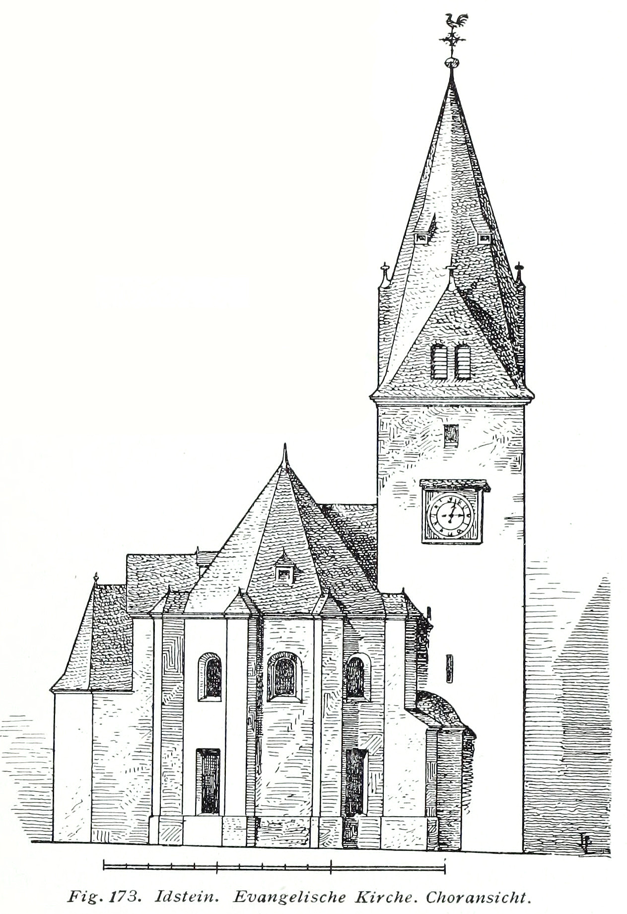 Idstein Evangelische Kirche Choransicht